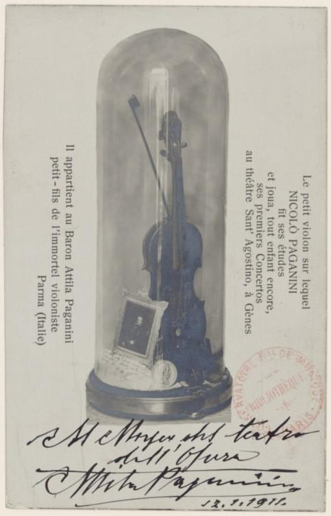 Le violon de Niccolo Paganini. Le texte de l'image dit : « Le petit violin sur lequel Nicolò Paganini fit ses études et joua, tout enfant encore, ses premiers Concertos au théatre Sant' Agostino, à Gènes. Il appartient au Baron Attila Paganini petit-fils de l'immortel violoniste. Parma (Italie). ».